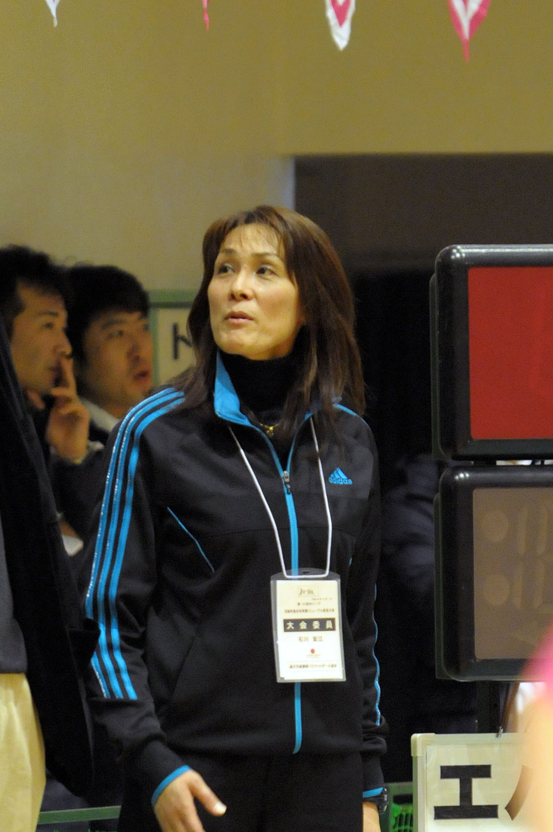 元シャンソンVマジック、柿崎宏江。羽後町総合体育館で。